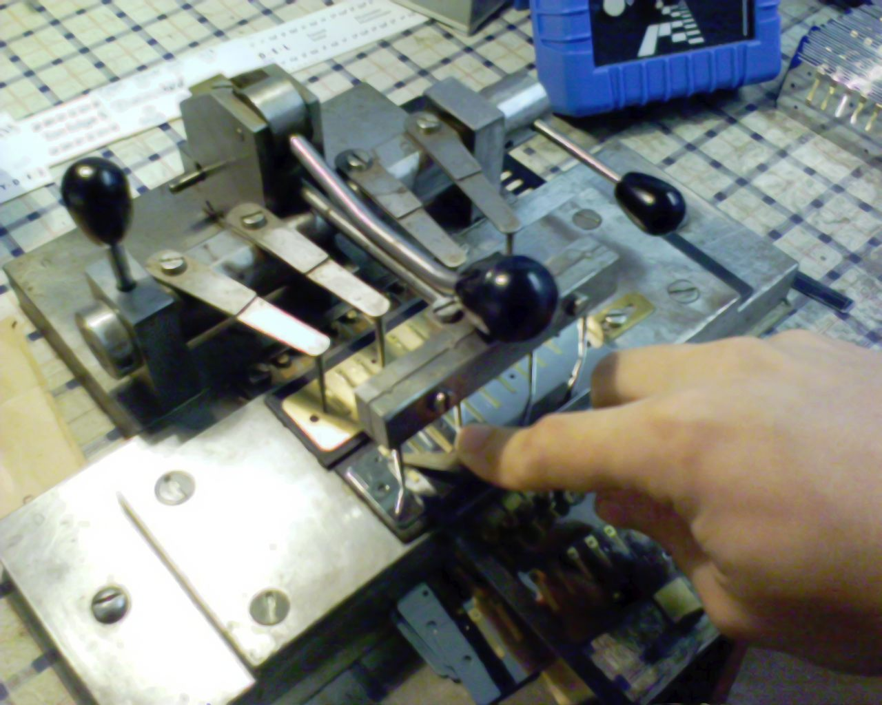 Das stimmen einer Mundharmonika. Auf einem Stimmtisch wird die Platte aufgespannt und durch abfeilen der Tonzunge gestimmt. Die hintere Platte ist die Musterplatte nach der gestimmt wird.